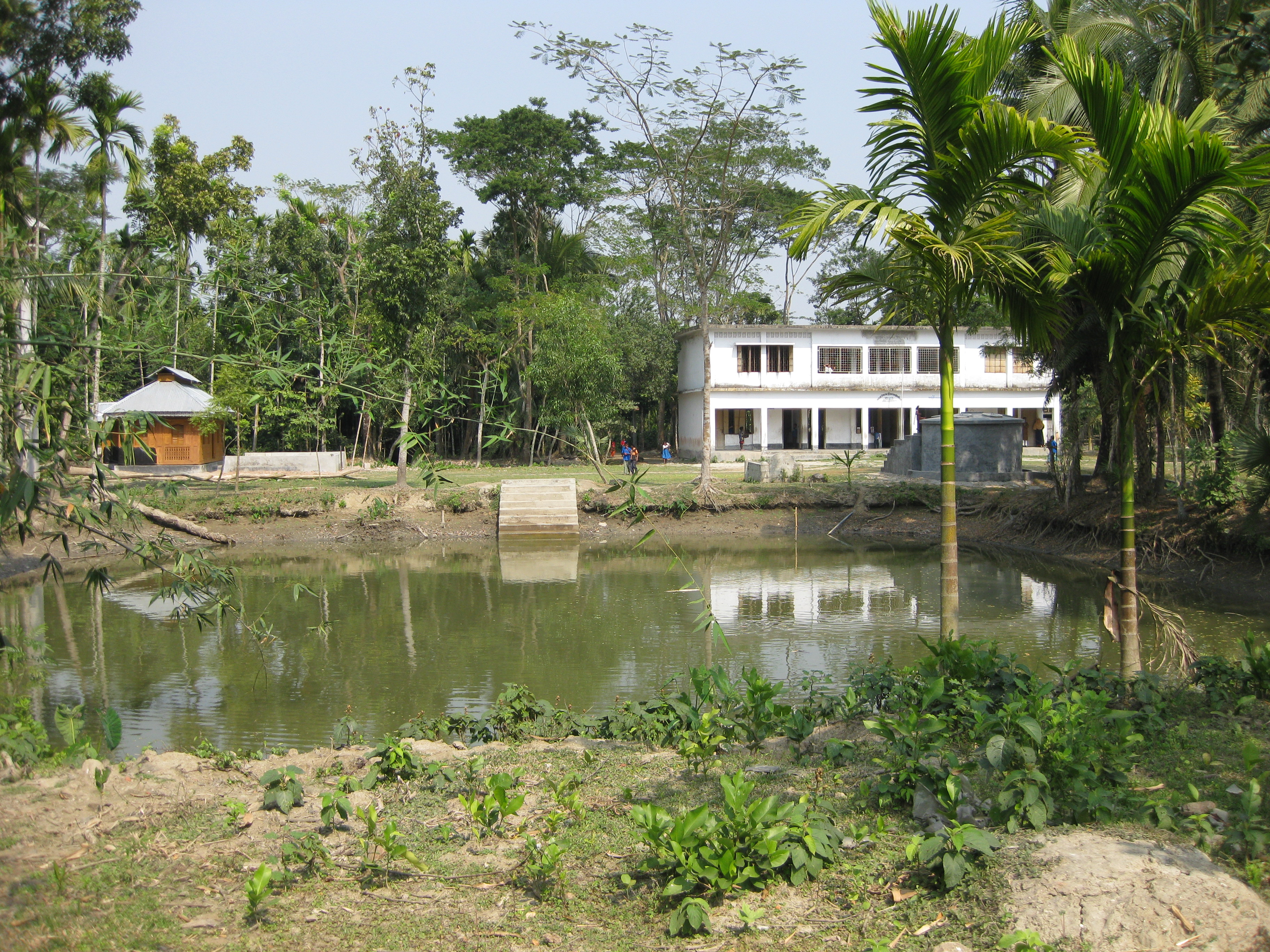 Akon Bari